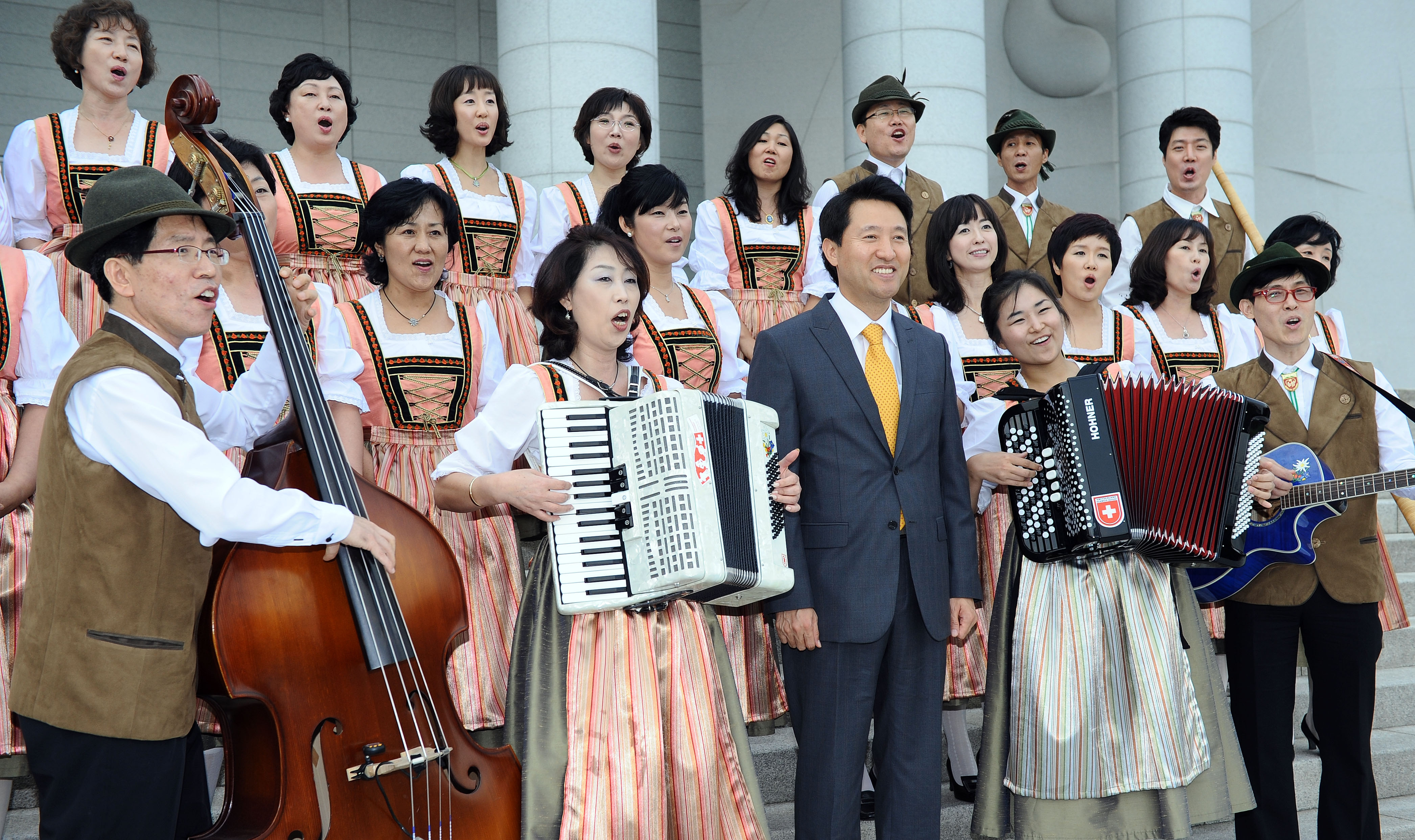 서울특별시 소방재난본부 소장 사진. photos of Seoul Metropolitan Fire & Disaster Headquarters.